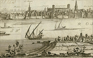 Vue d’Arles en 1660 (détail). Eglise Saint-Pierre de Trinquetaille, dite de Saint-Pierre-le-Vieux (ou Saint-Pierre-de-Gallègue), démolie en 1786.